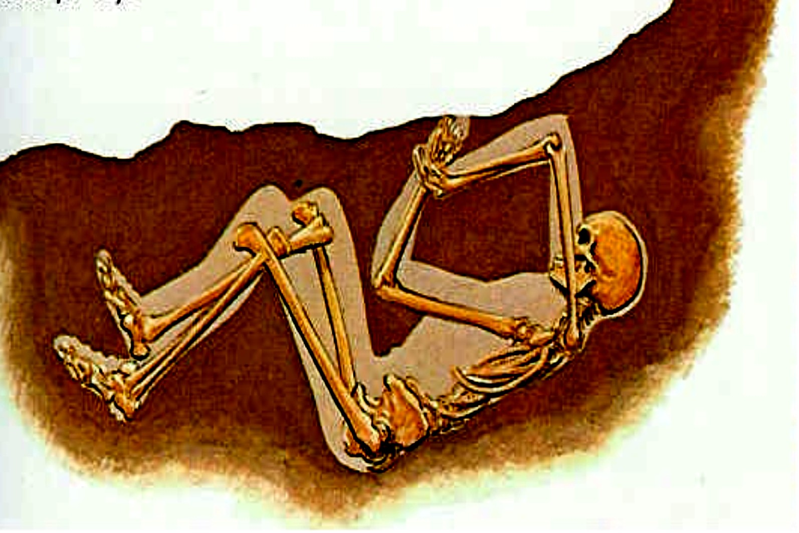 Vaciado en yeso de un víctima de Pompeya